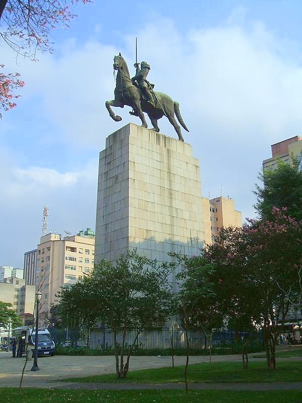 Monumento ao Duque de Caxias, de Victor Brecheret, na Praça Princesa Isabel, distrito de Santa Cecília, São Paulo, Brasil.